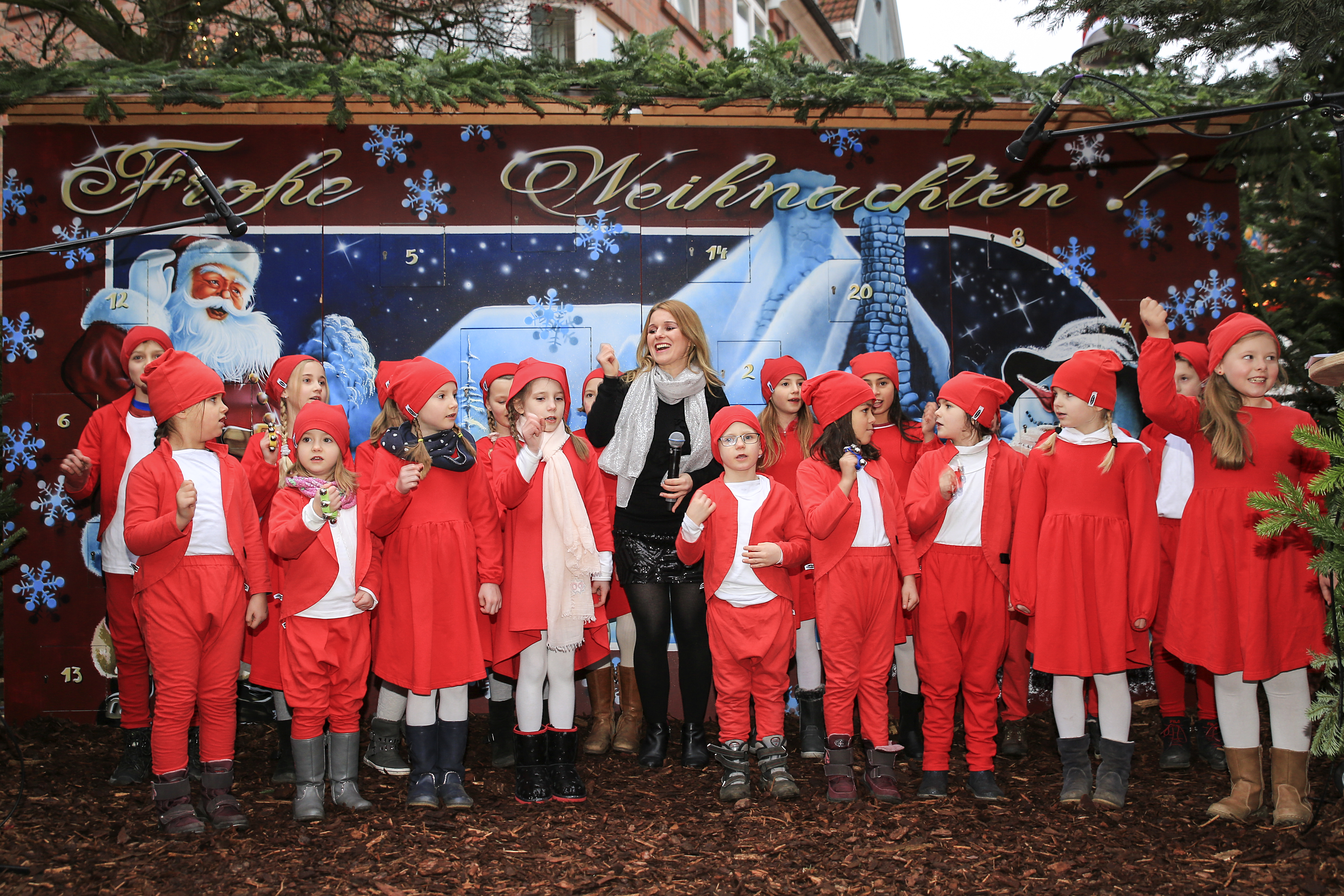 Nadine Sieben und die Zwerge beim Wintermärchen Buxtehude 2017